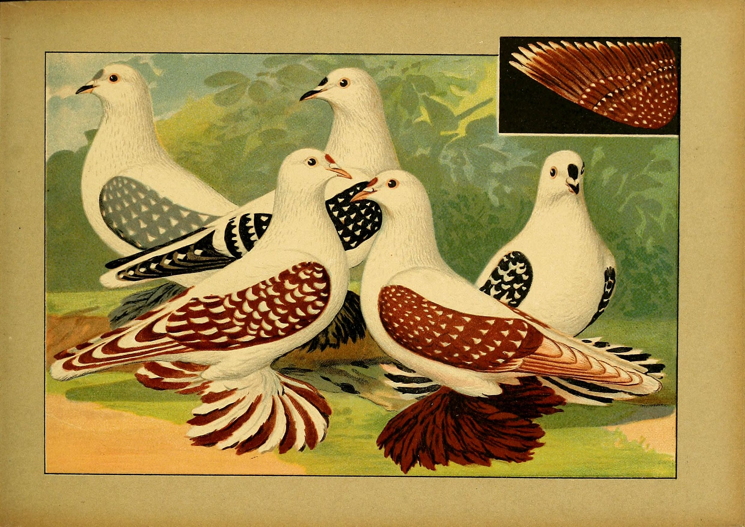 Deutsch